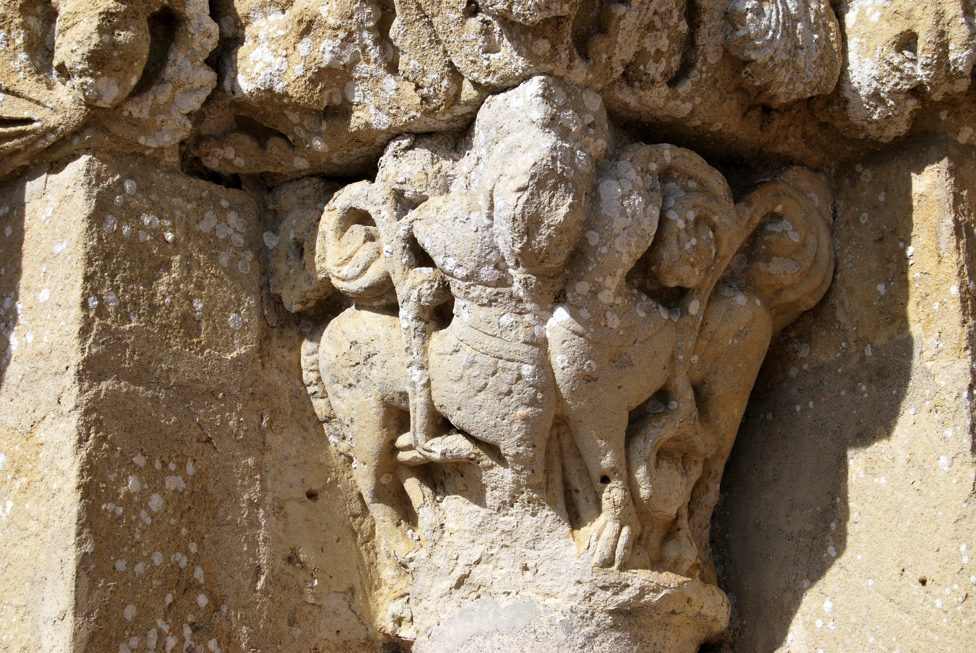 Chapiteaux de l'église Notre-Dame de Castelviel